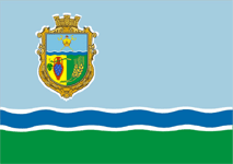 Прапор Миколаївського району Миколаївської області